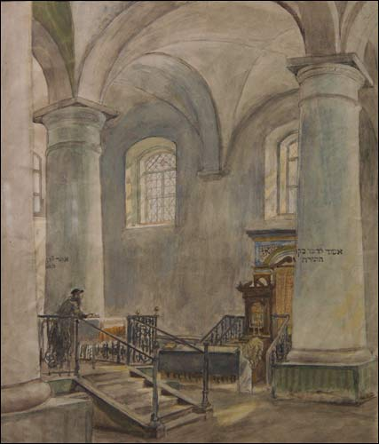 Мінская халодная сінагога, Я. М. Кругер 1921